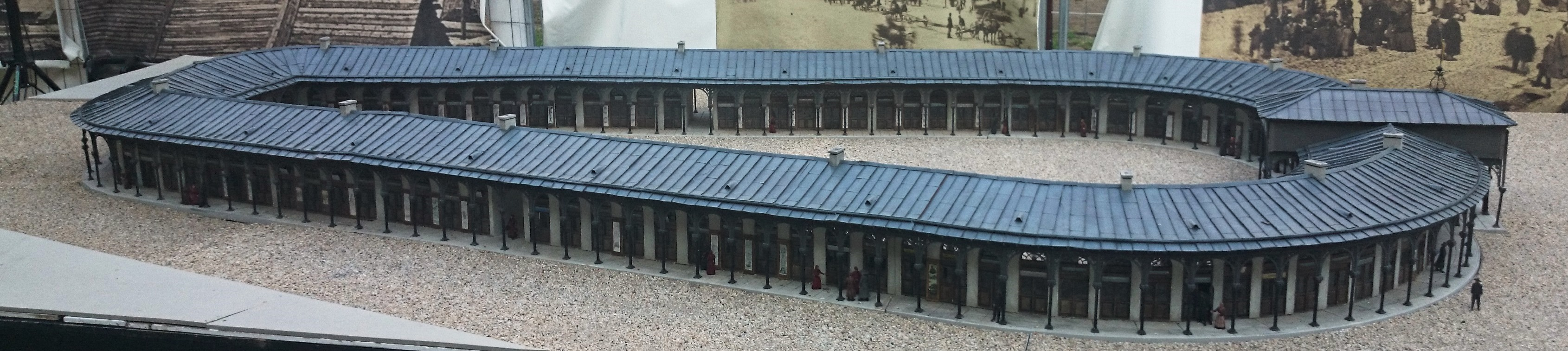 Model Gościnnego Dworu w Warszawie przedstawiony na Wystawie Miniatur Województwa Mazowieckiego – widok od strony ul. marszałkowskiej